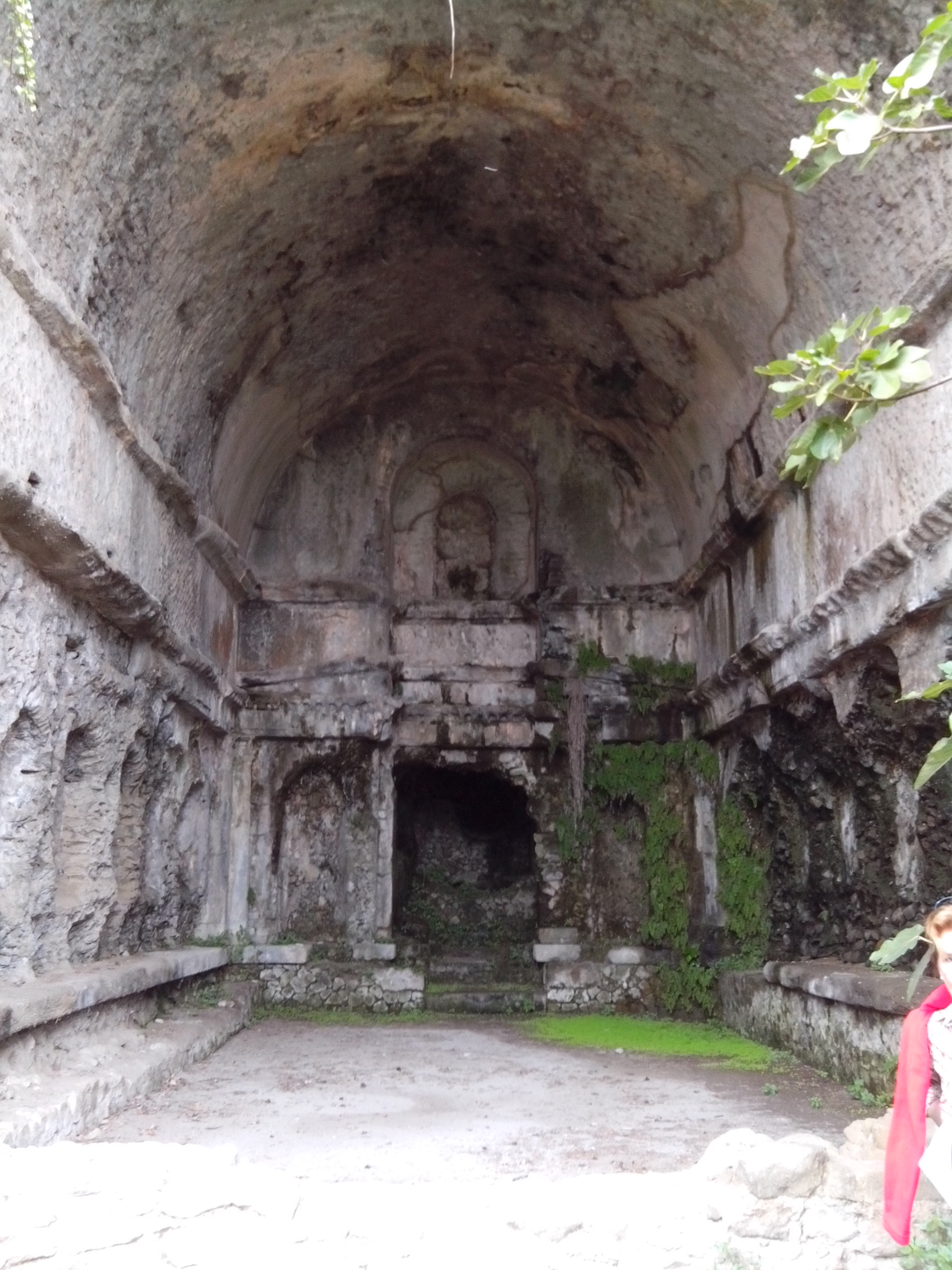 Ninfeo Dorico sulle sponde del lago Albano - Castel Gandolfo (Roma)